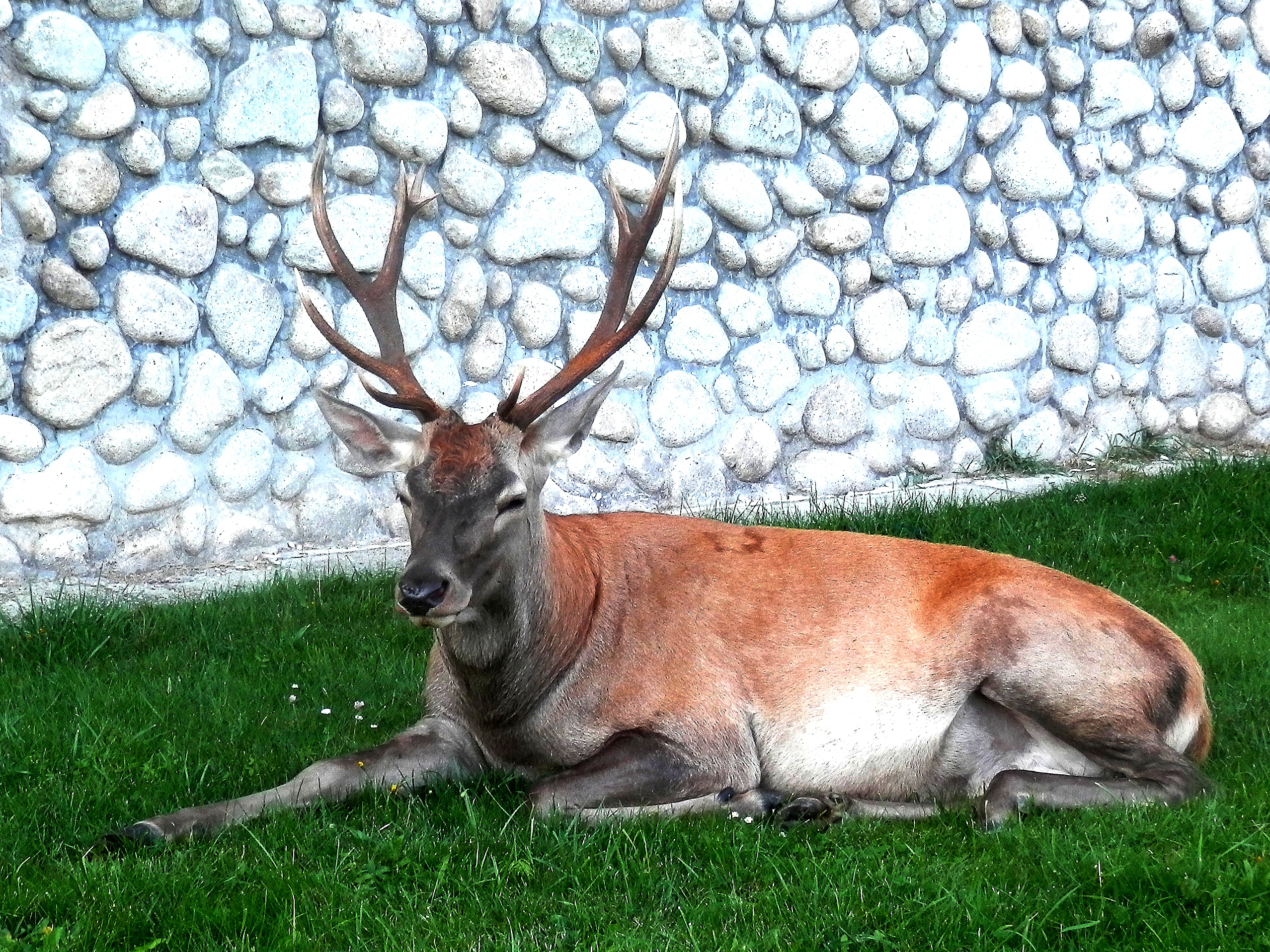 Leto 2019. Jeleň v areáli hotela, Tatranské Zruby, mesto Vysoké Tatry. Slovensko.